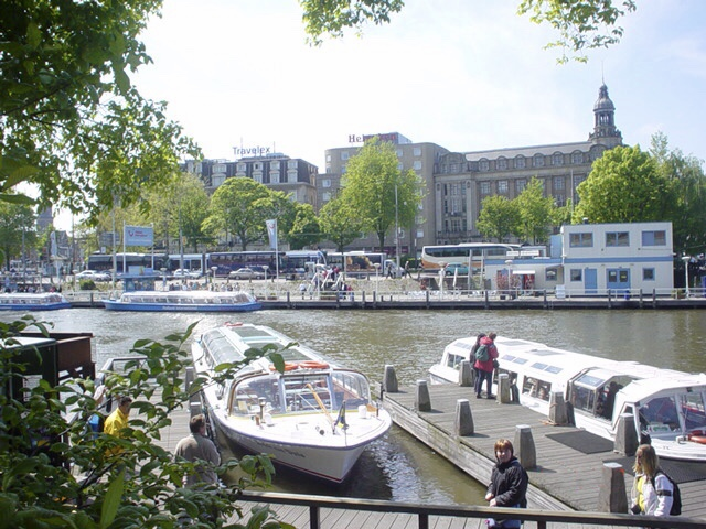 Canal Bus in Amsterdam